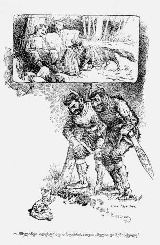 დედა ენა